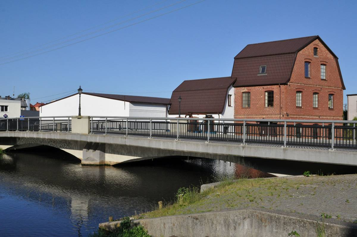 Most na Redze znajdujący się w Resku